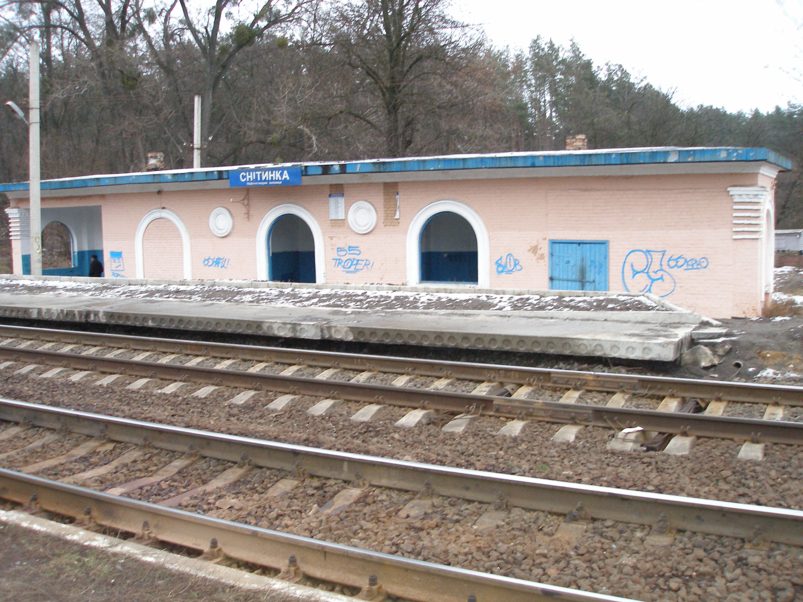 Снітинка. Пасажирський павільйон